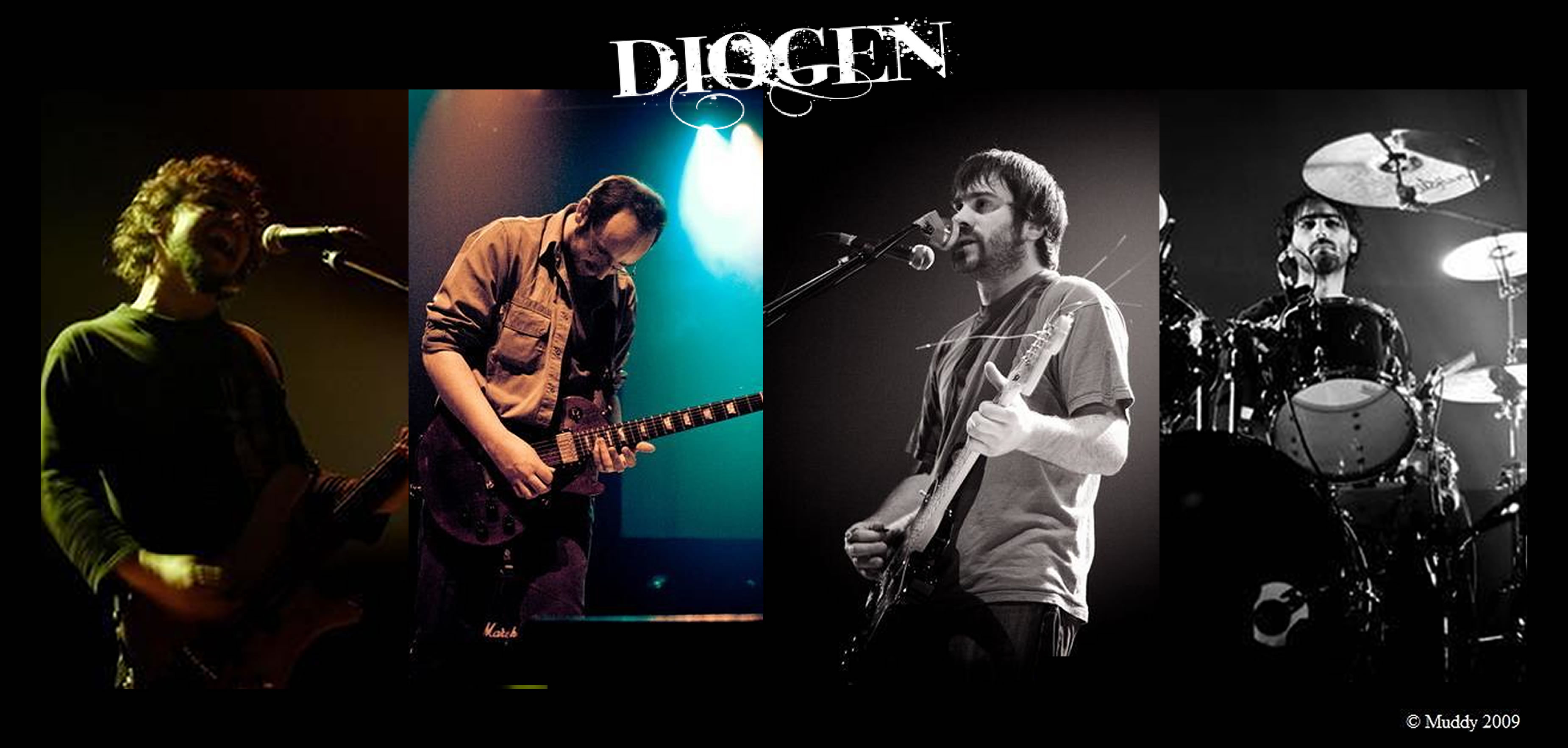 diogen